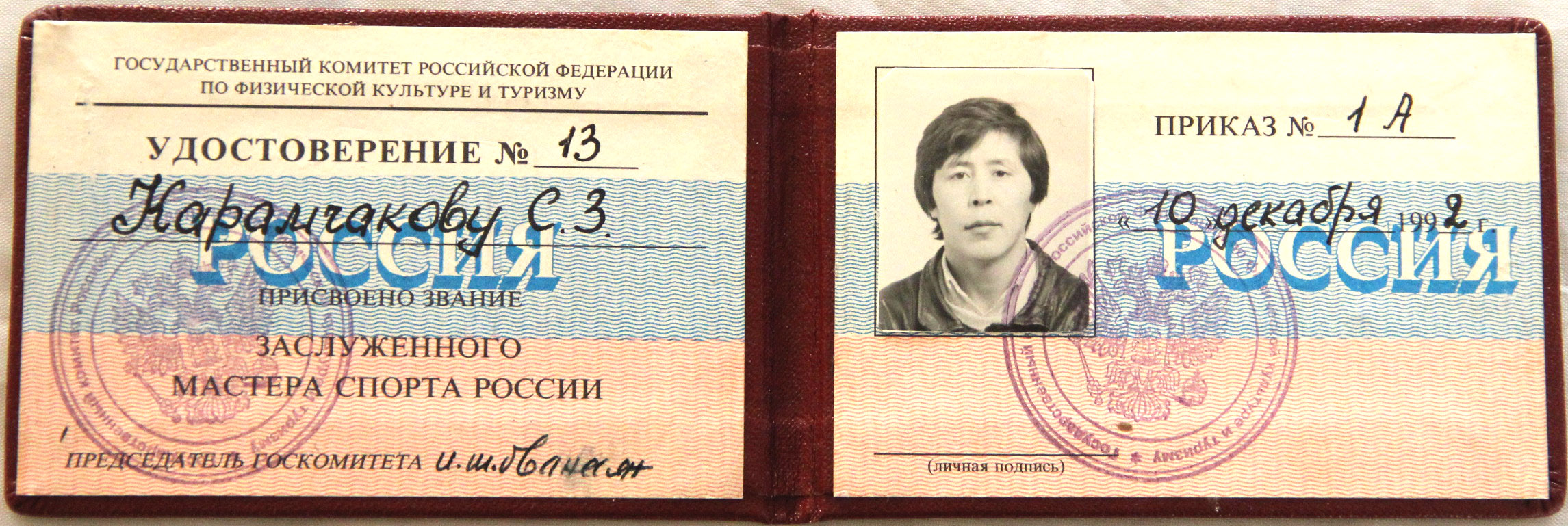 Удостоверение к званию "Заслуженный мастер спорта России" № 13, выданное в 1992 году Сергею Захаровичу Карамчакову.